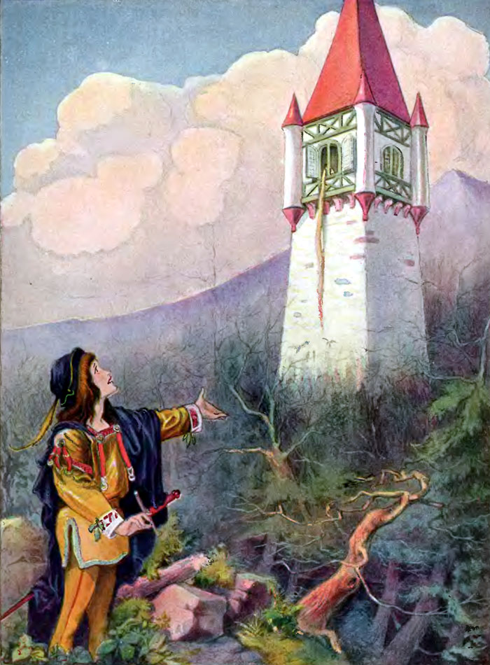 Rapunzel - Project Gutenberg etext 11027